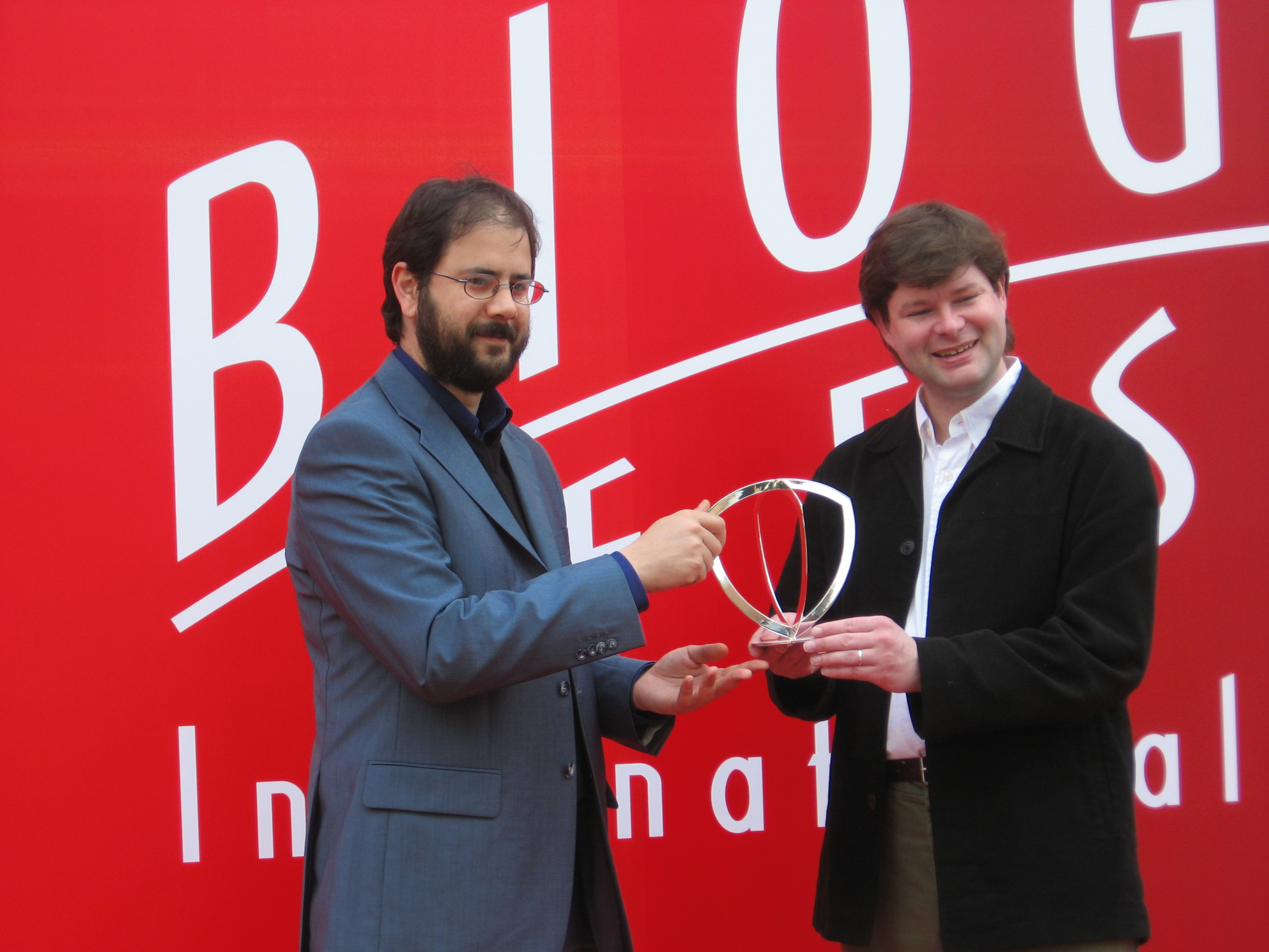 Premiazione di Paul Collins (sulla destra) Biografilm festival 2008